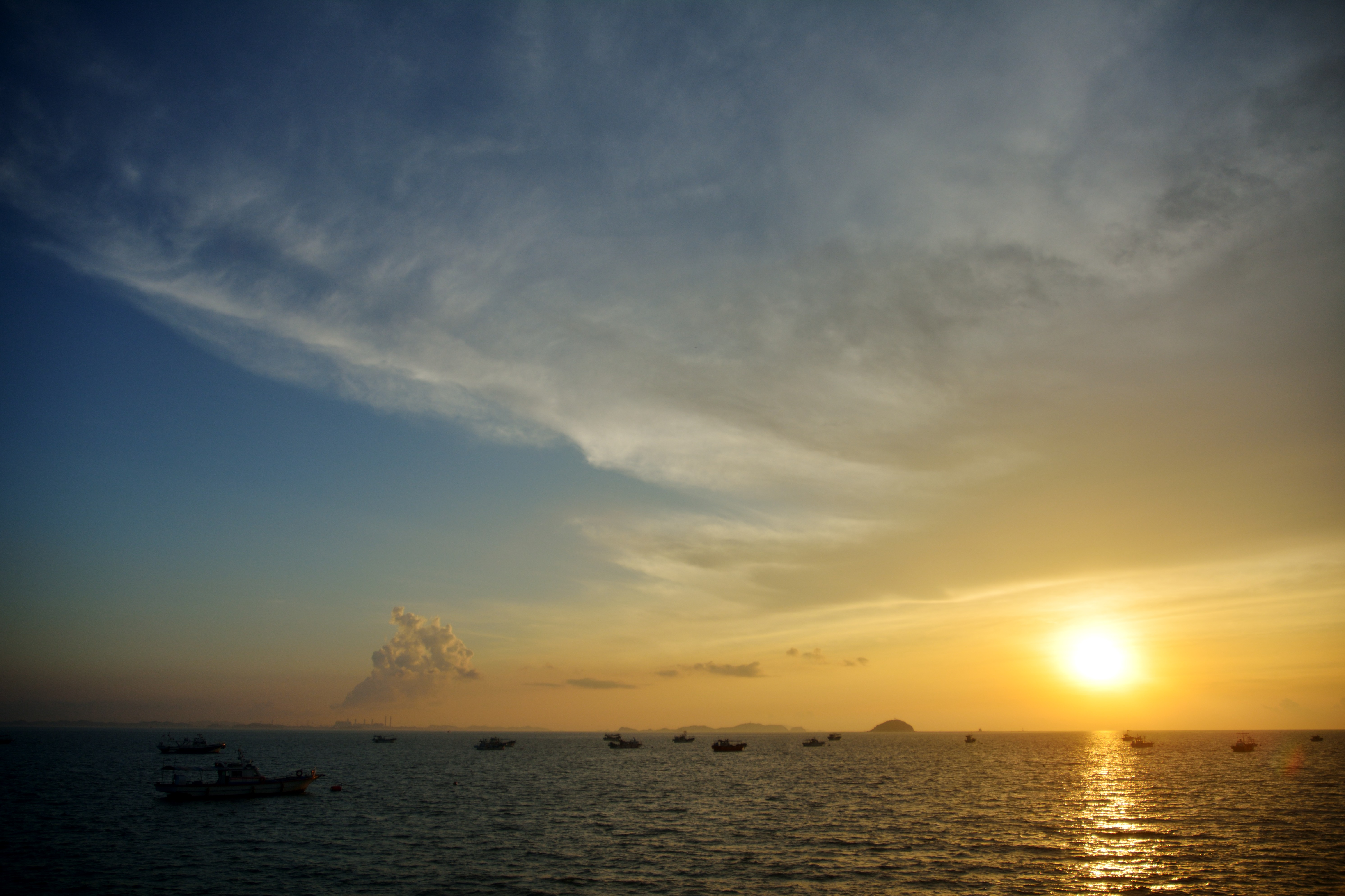 궁평항.